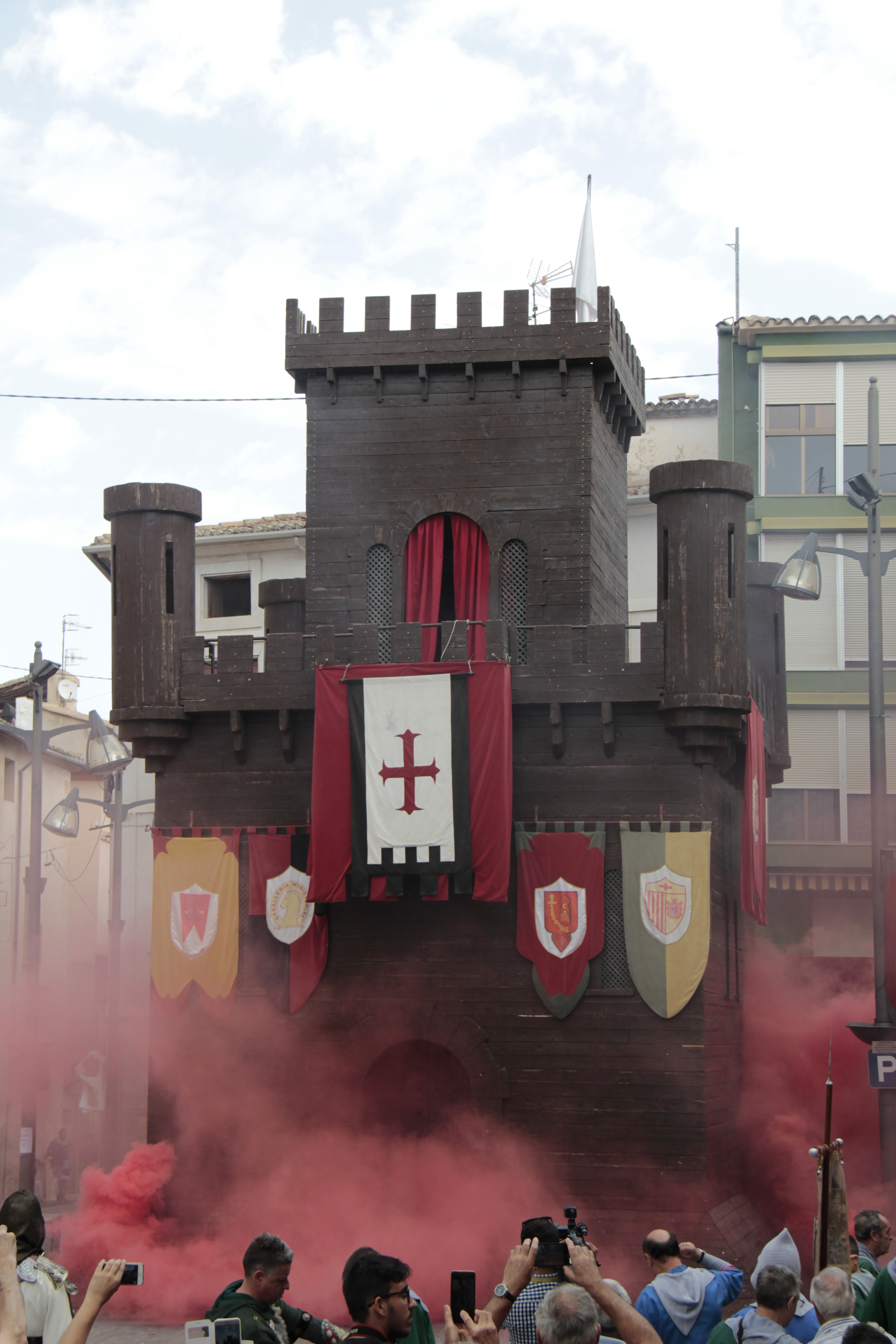 Cocentaina, Alicante.